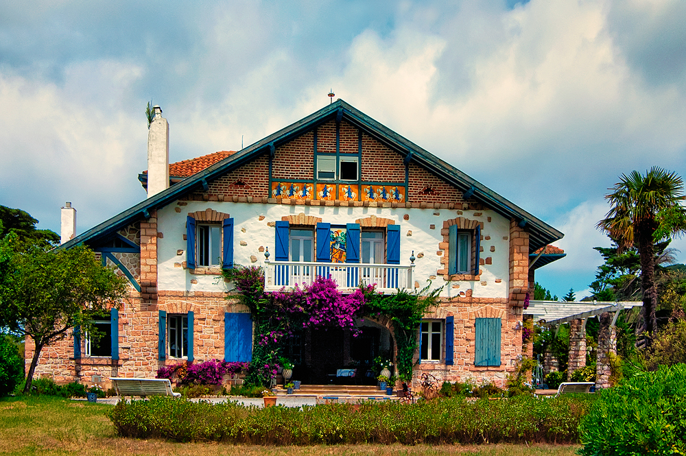 Casa Museo de Zuloaga en Zumaya (Zumaia). País Vasco (Euskadi).